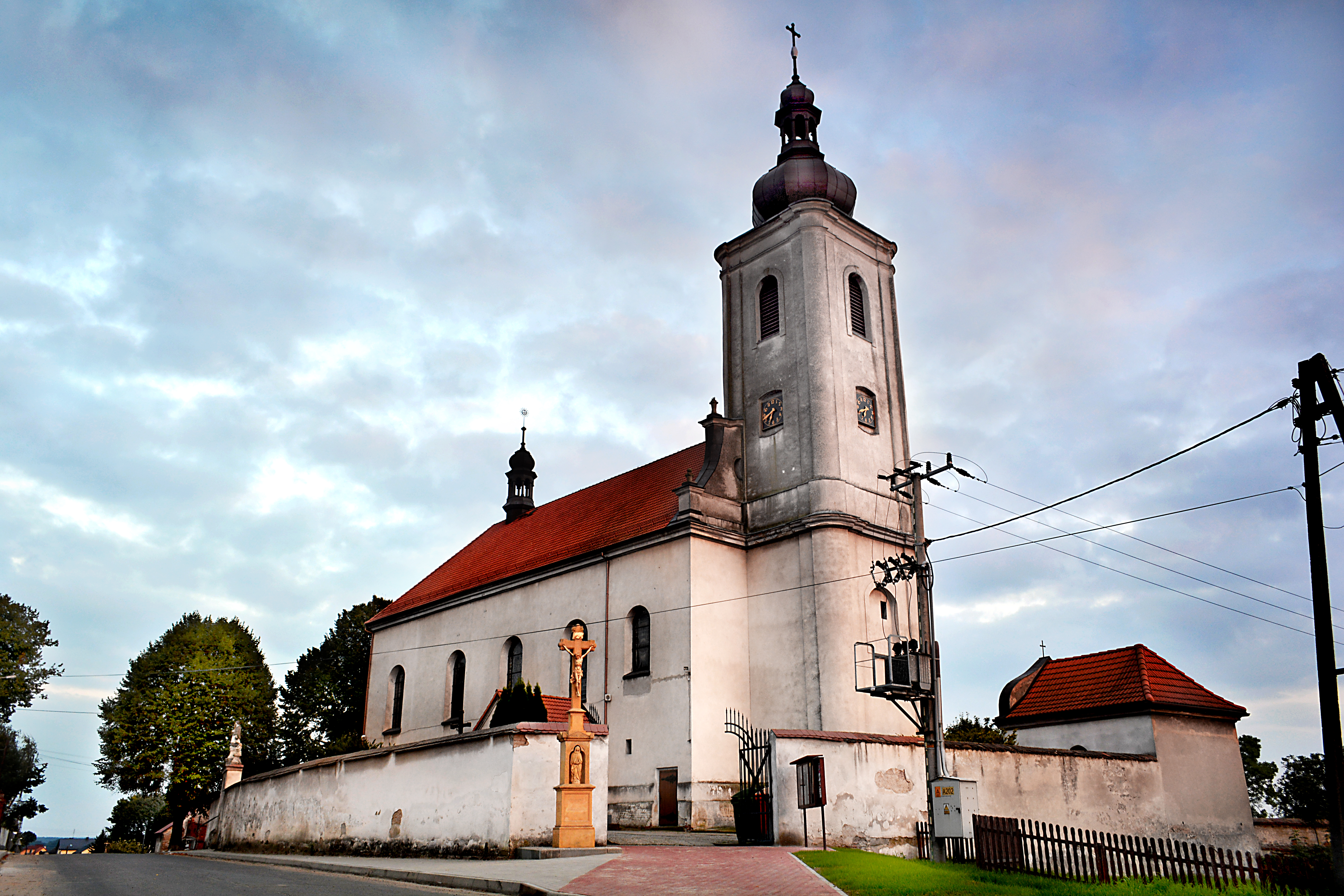 Bieńkowice, kościół par. p.w. Wszystkich Świętych, 1719-1730